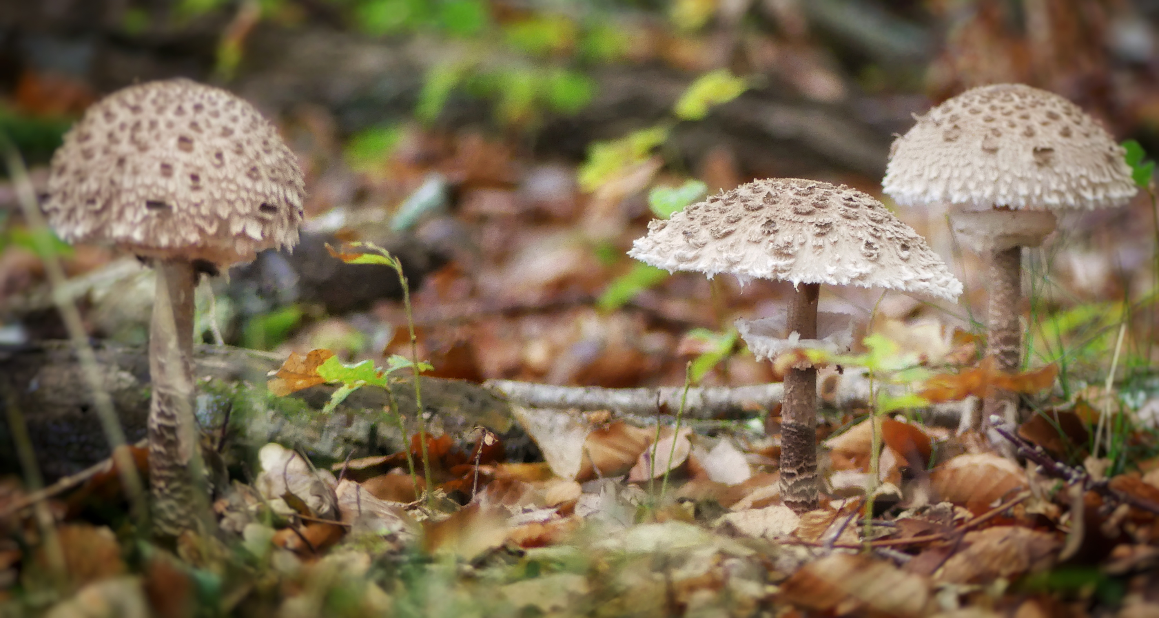 Champignon ayant donné son nom aux habitants de la commune de Saint-Plaisir en Allier : les Cocheriaux.